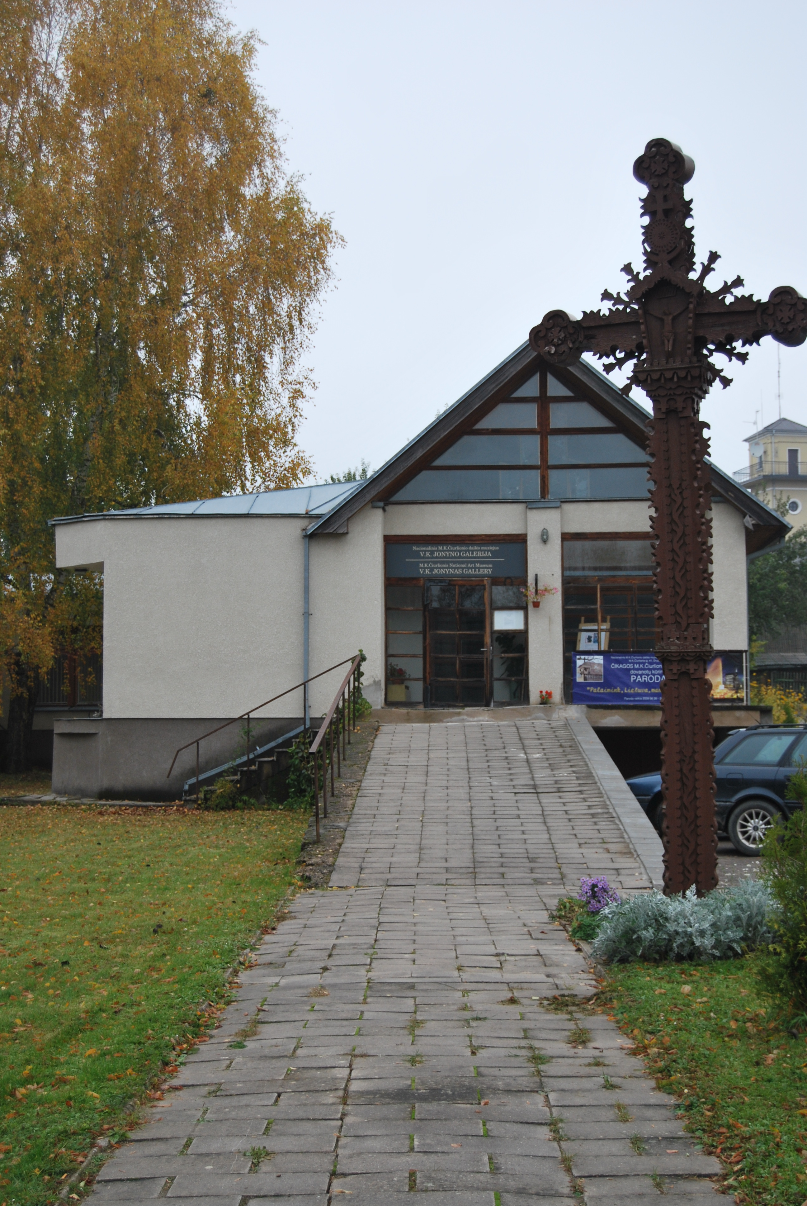 Galeria V. K. Jonynasa (wejście)październik 2009 r.